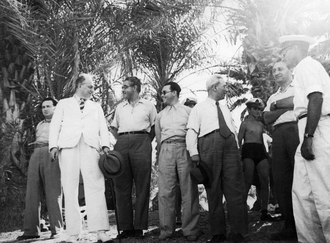 ועד הנאמנים מבקר את הקדטים במחנה הקיץ בקיסריה 1940